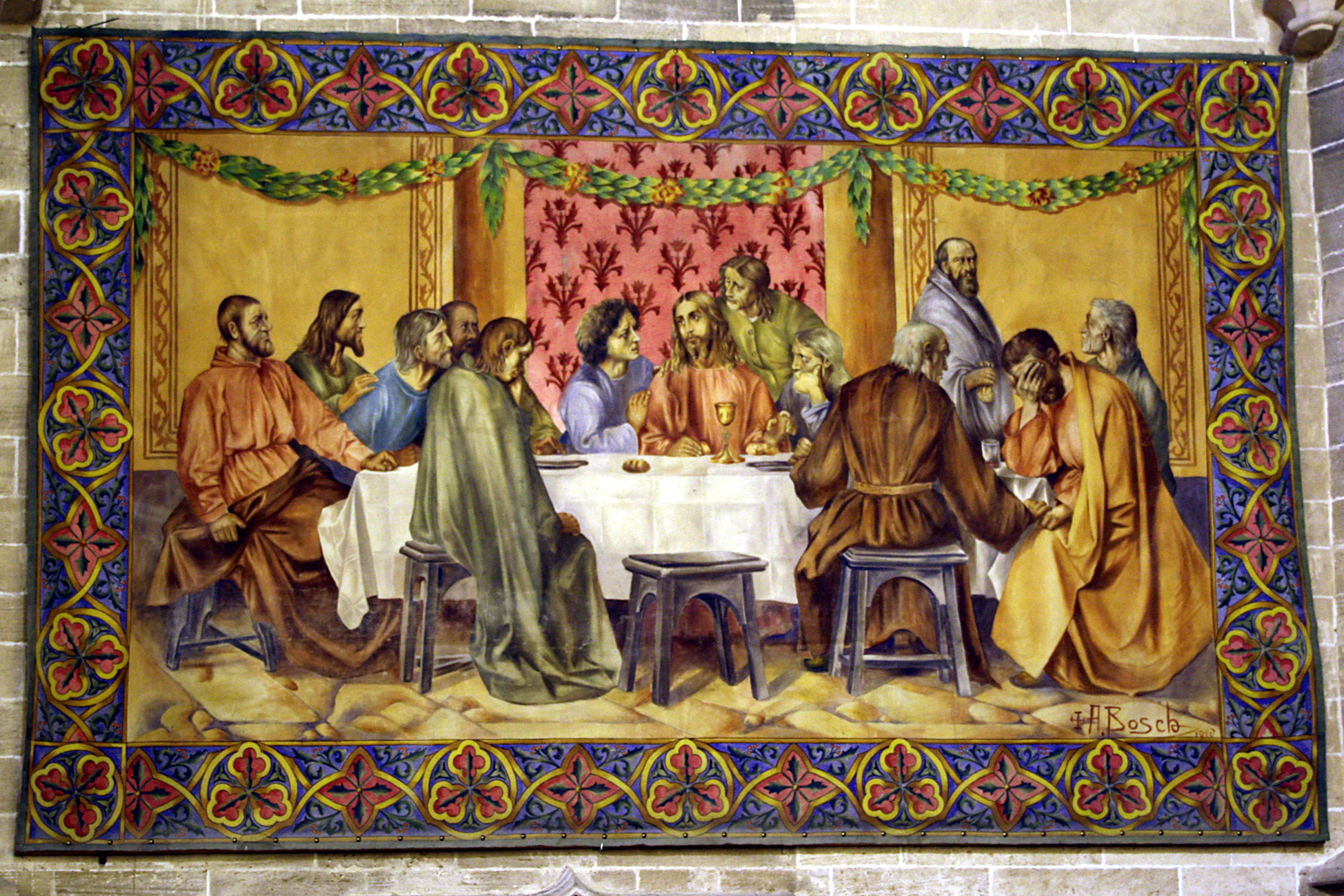 Iglesia de Sant Jaume, Alcúdia, Mallorca, Spain